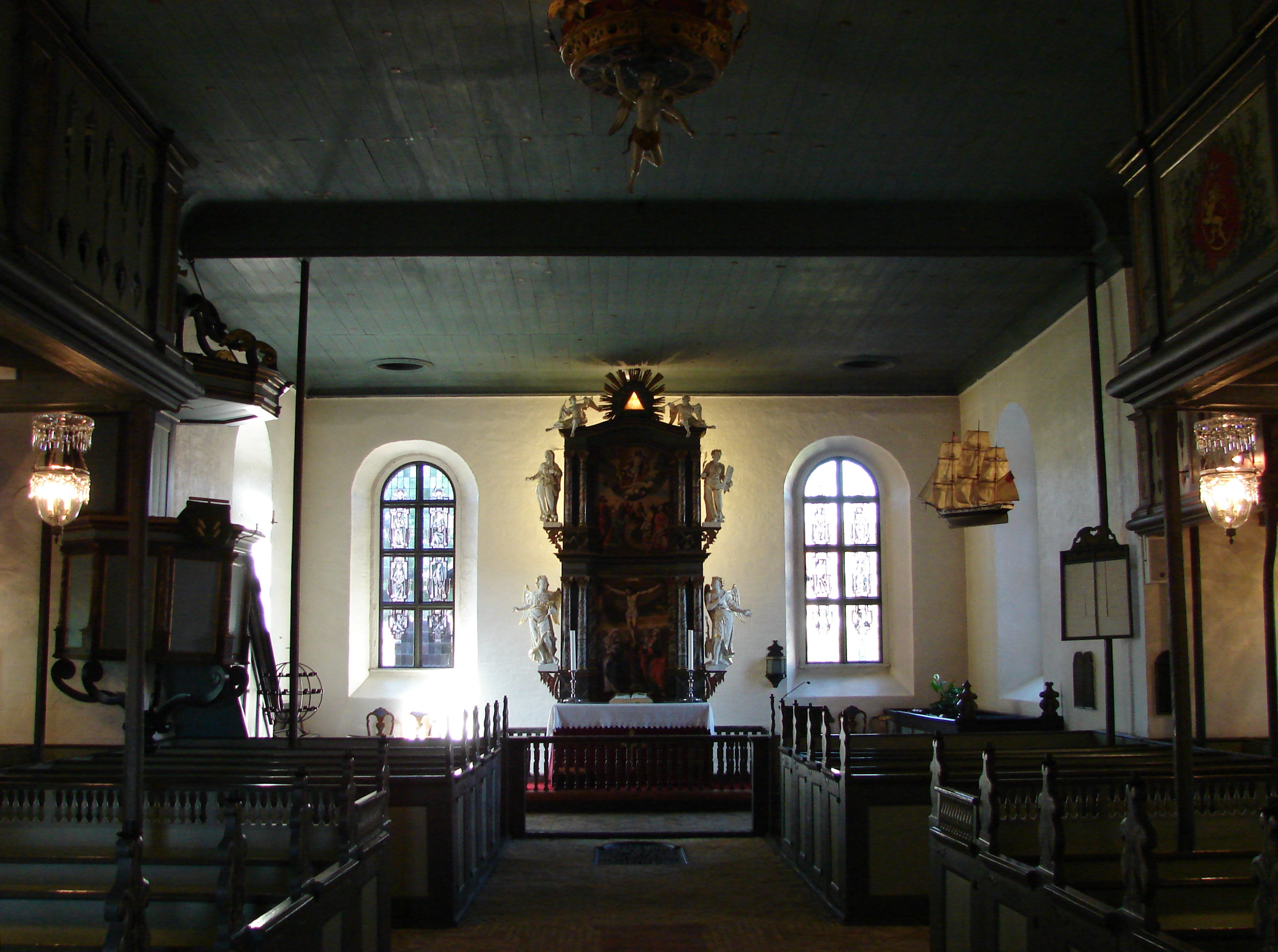 Stavern kirke, Vestfold, Norge. Altertavle: Korsfestelsen af Jacob Pedersen Lindgård